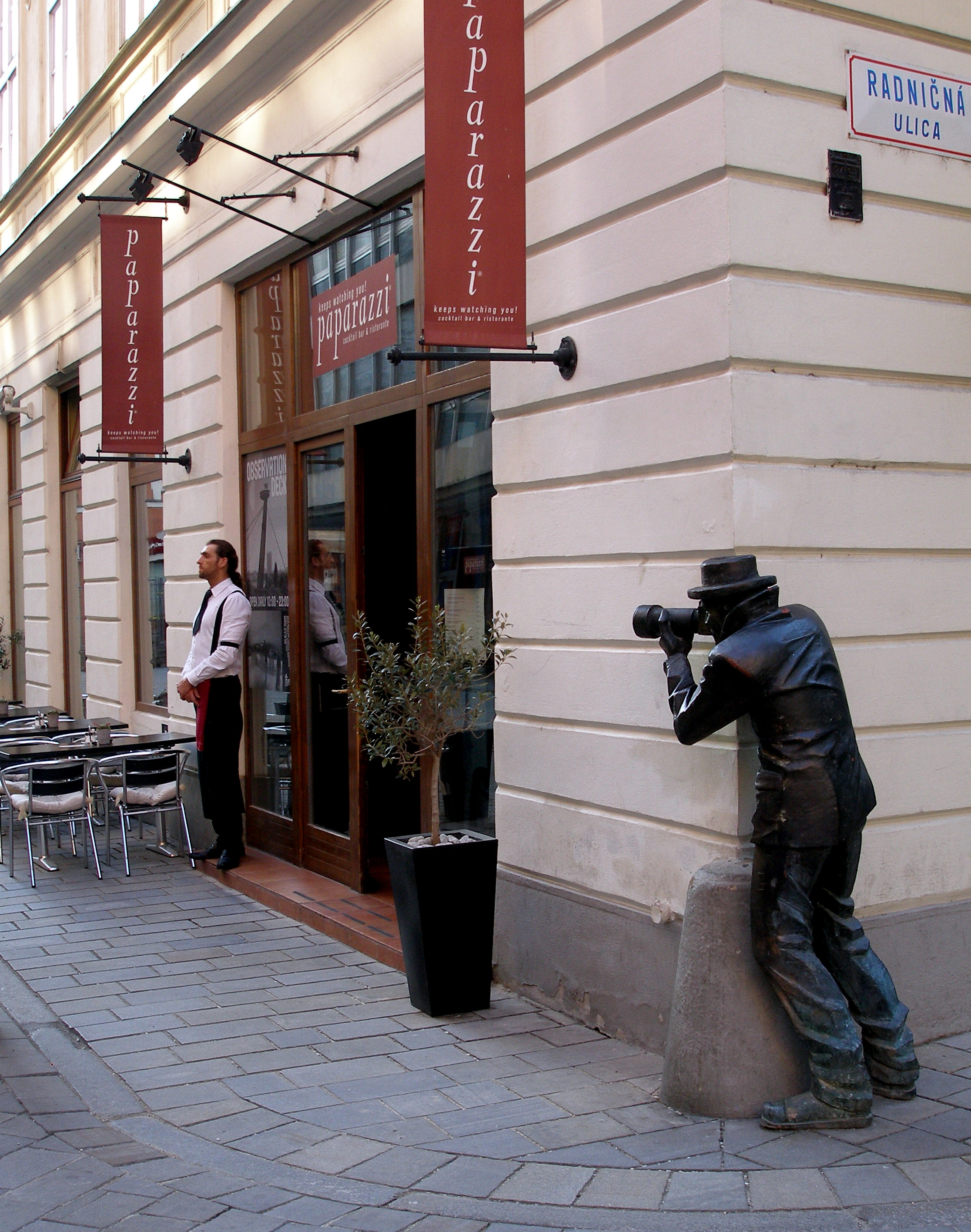 Socha a reštaurácia Paparazzi Radničná ulica v Bratislave na veľkonočný Veľký piatok 2009